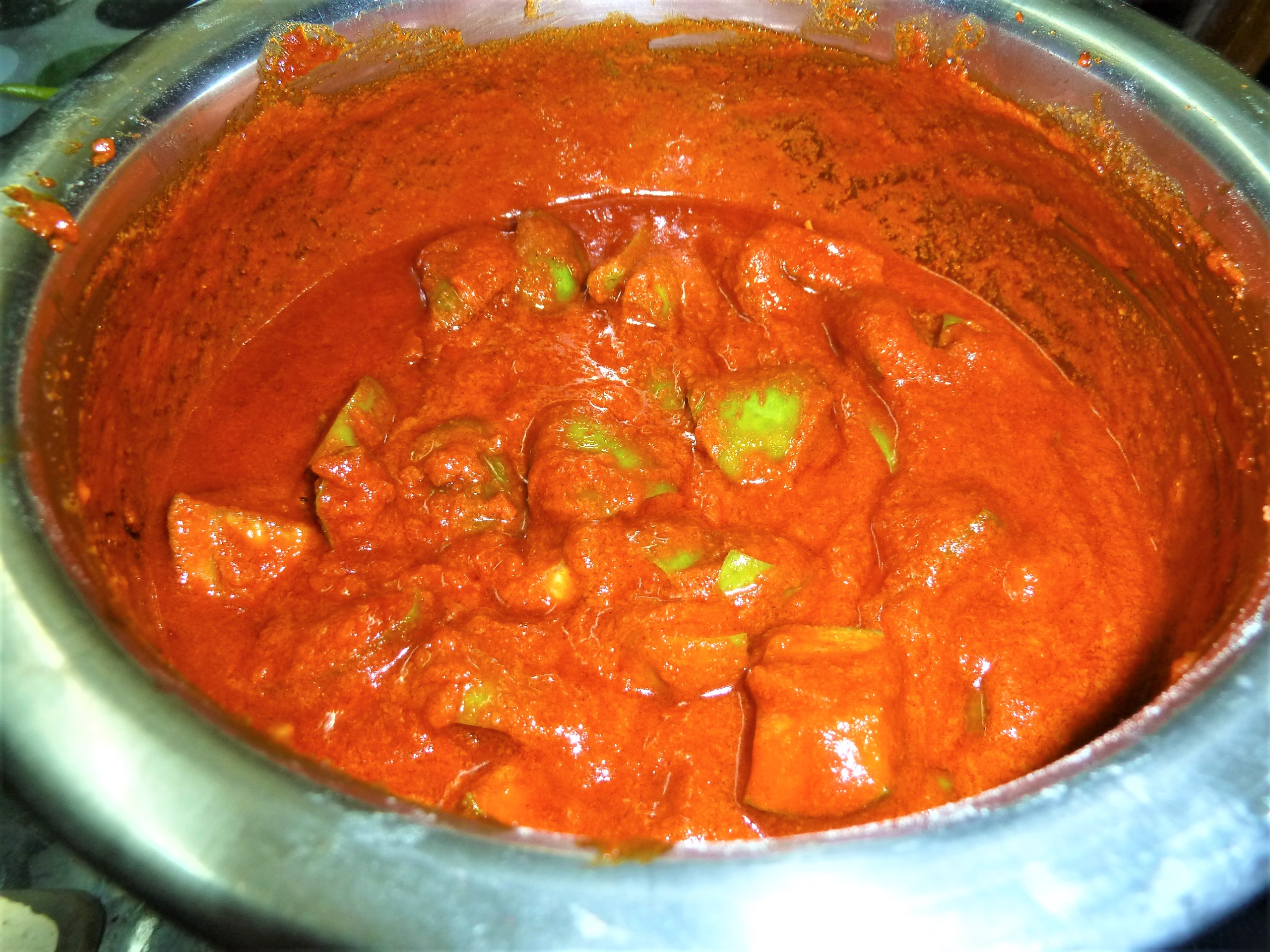 పెసర ఆవకాయ